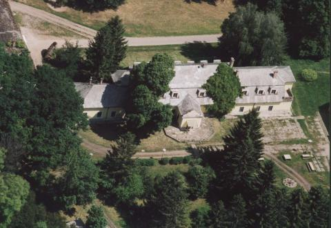 Kállósemjén, Kállay-kúria, azonosító: 8262 törzsszám: 6122. Diákotthon, volt Kállay-kúria, barokk, 1750 körül, építette: Salvador Aprilis. Átalakítva. Természetvédelmi terület.